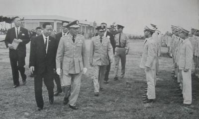 中文（台灣）: 明新工專時期升旗。